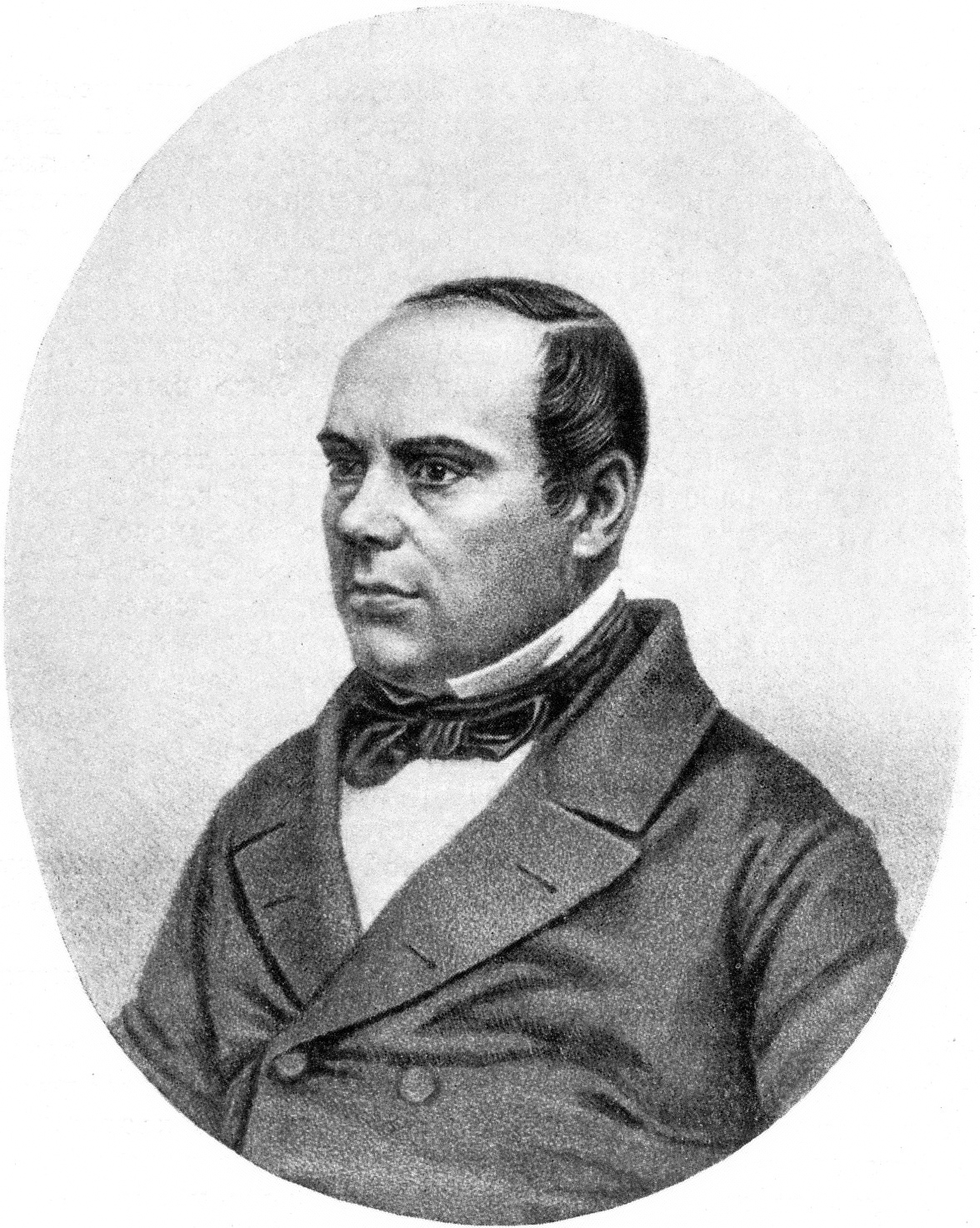 Воскресенский Александр Абрамович — химик, член-корреспондент Петербургской АН.